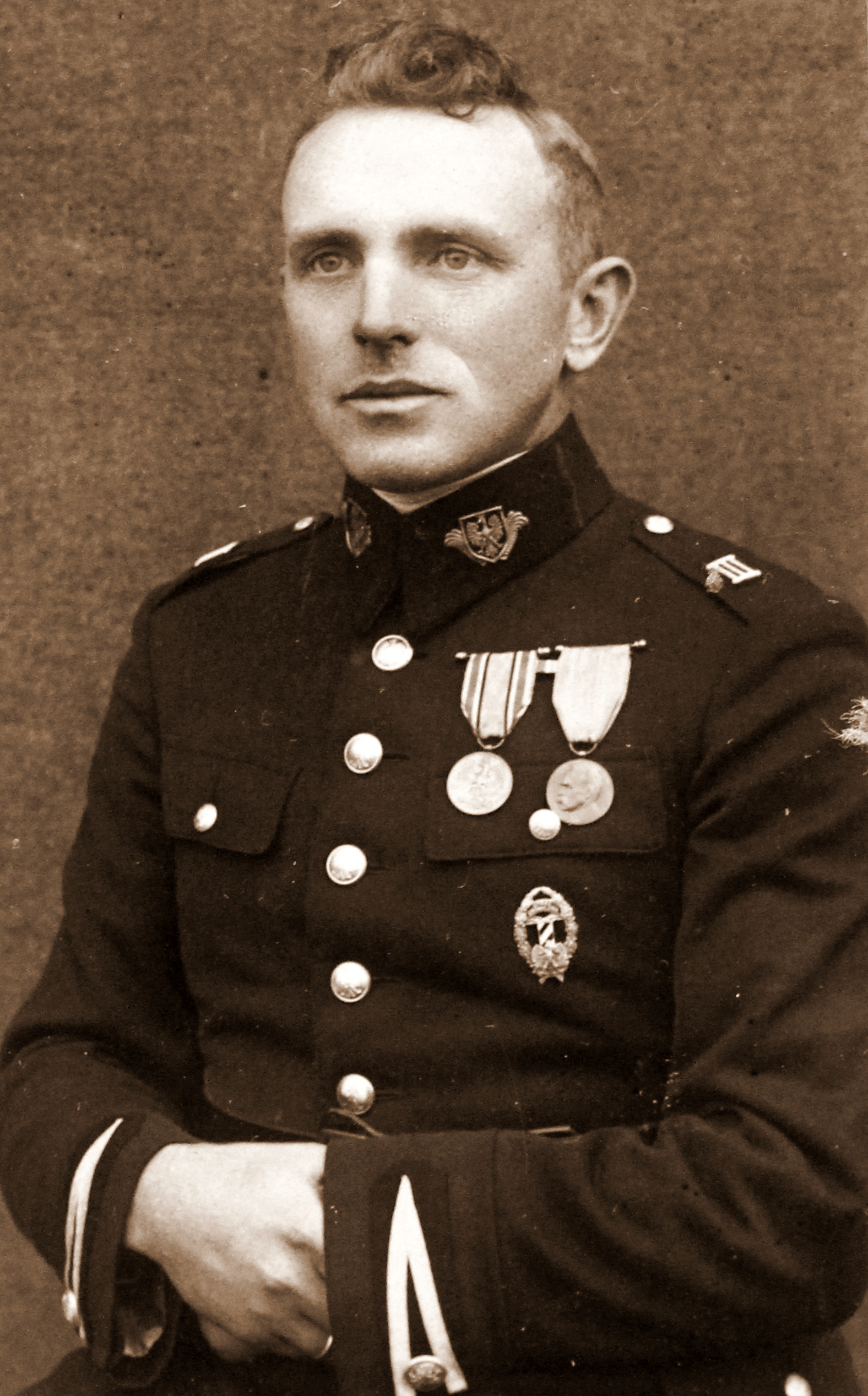 starszy przodownik Ignacy Stachowski - pomocnik komisarza